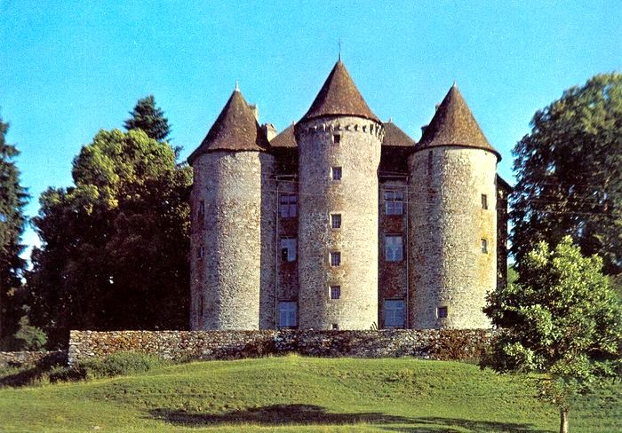 Château de Pierrefite.